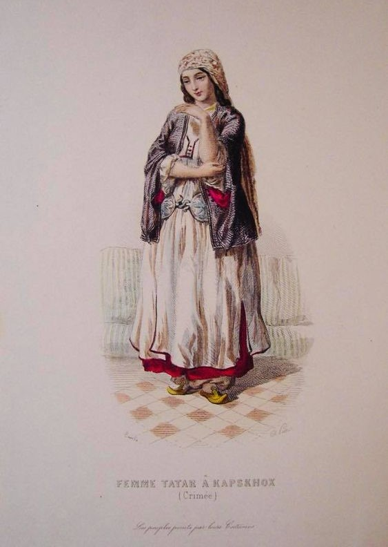 Рисунок "Крымская татарка из Капсихора", 19 век